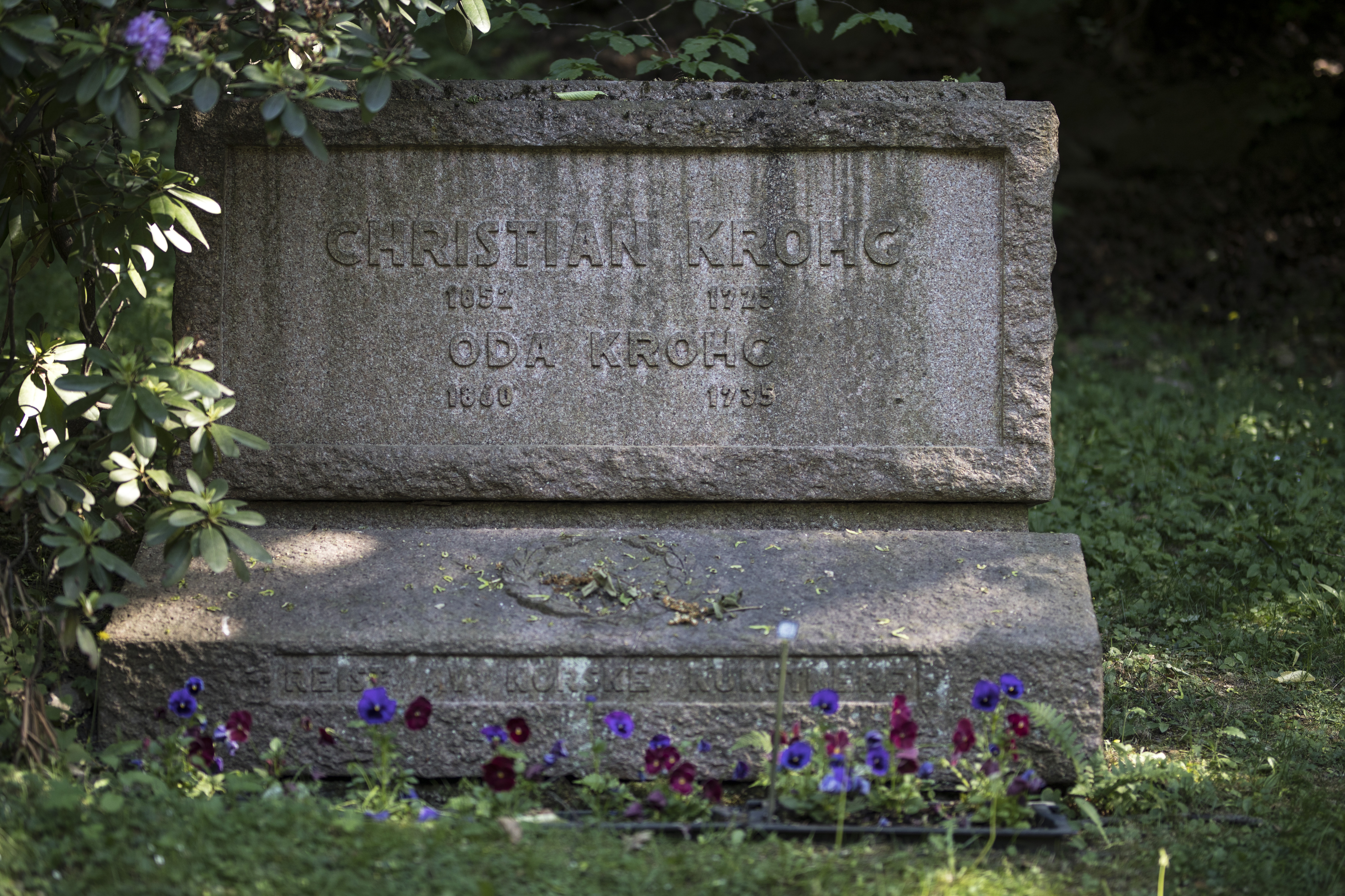 Gravstenen til Christian og Oda Krohg i Æreslunden til Vår Frelsers gravlund i Oslo.